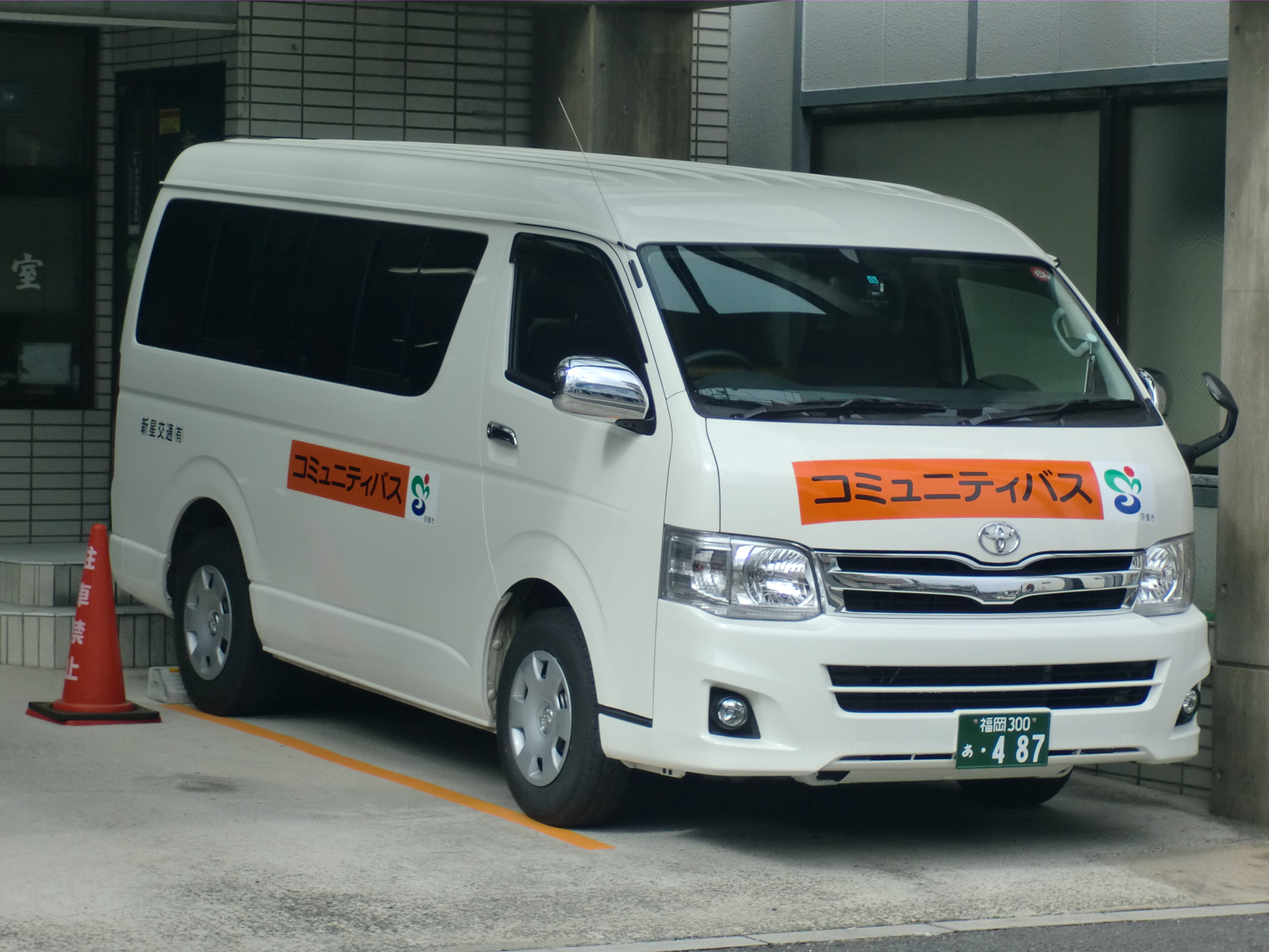 宗像コミュニティバス。